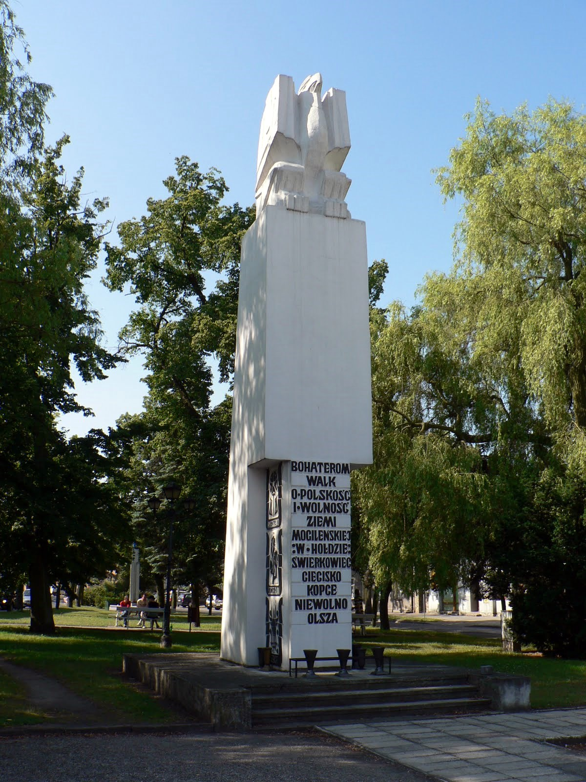 Pomnik ku czci bohaterów walk w Mogilnie